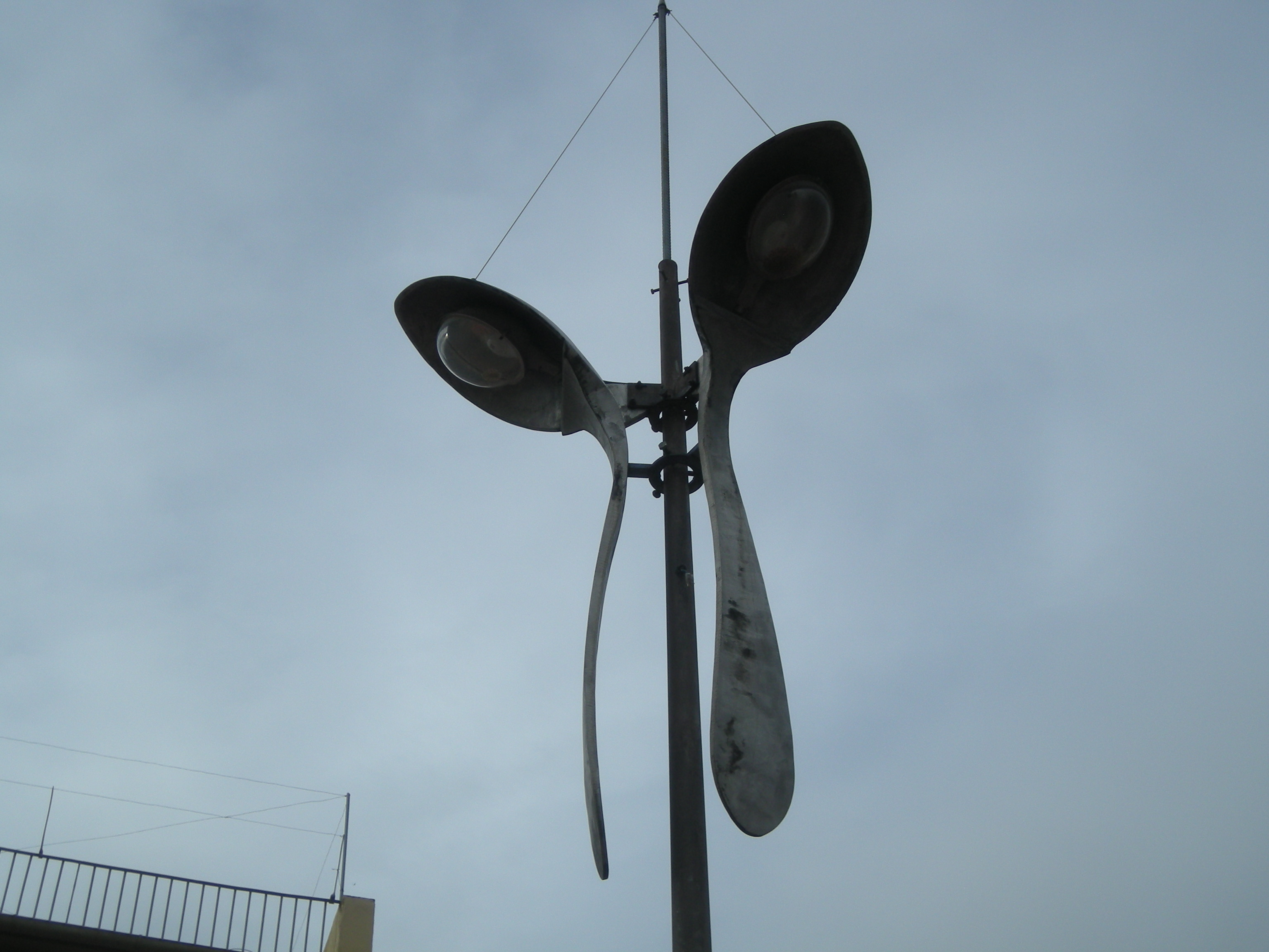 Faroles de Tortellà